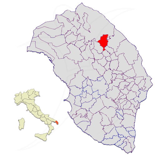 Il territorio del comune di Lizzanello nella provincia di Lecce